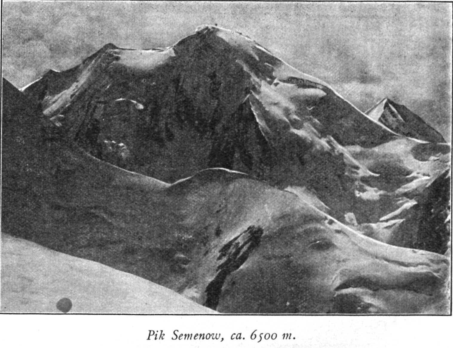 Pik Semenow, ca. 6500 m aus Zeitschrift des Deutschen und Oesterreichischen Alpenvereins 1906 Band 37